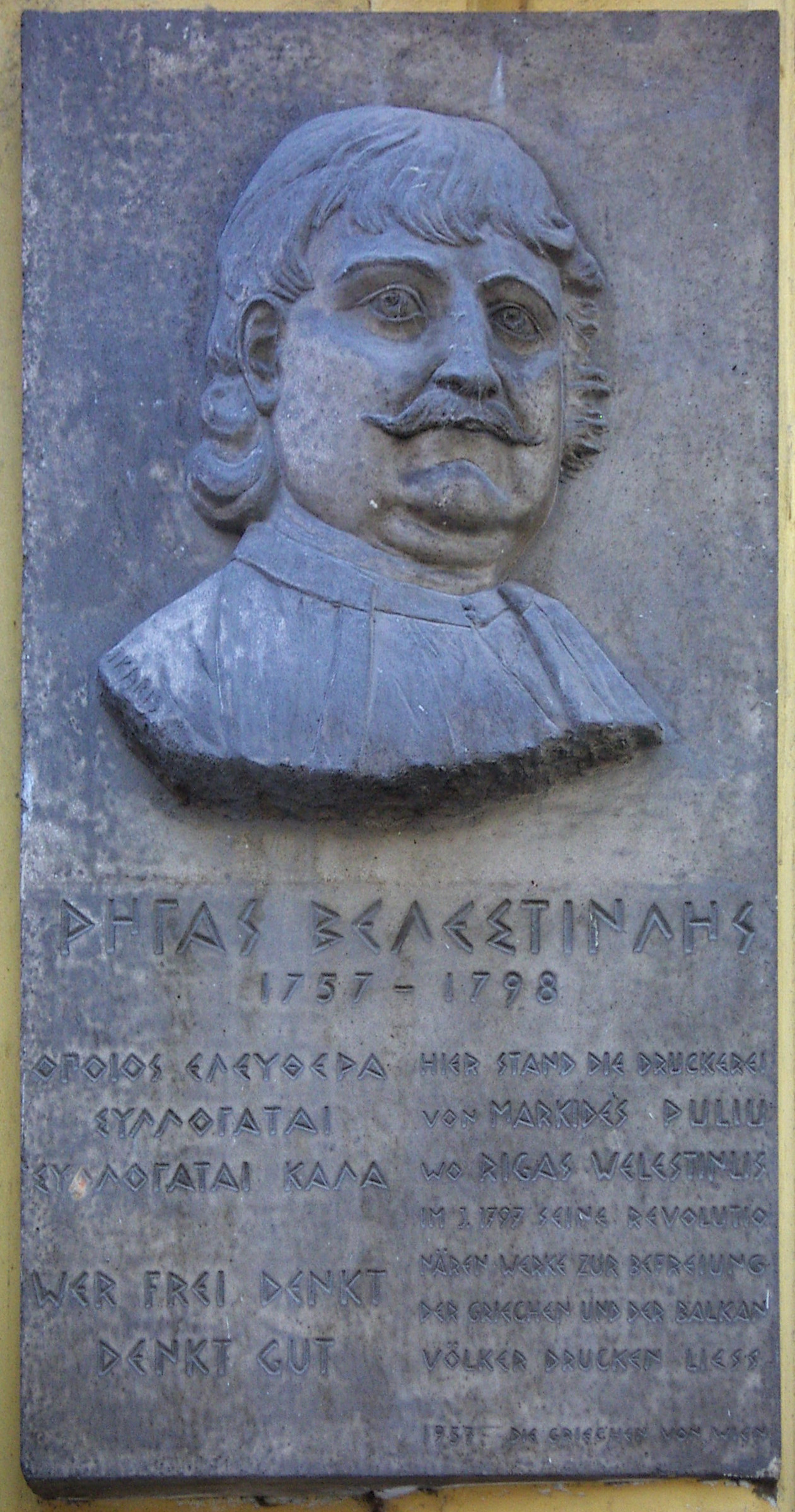 Rigas Velestinlis, hier Rigas Welestinlis, 1757-1798, Gedenktafel, Rotenturm-Straße 21, InnereStadt, Wien